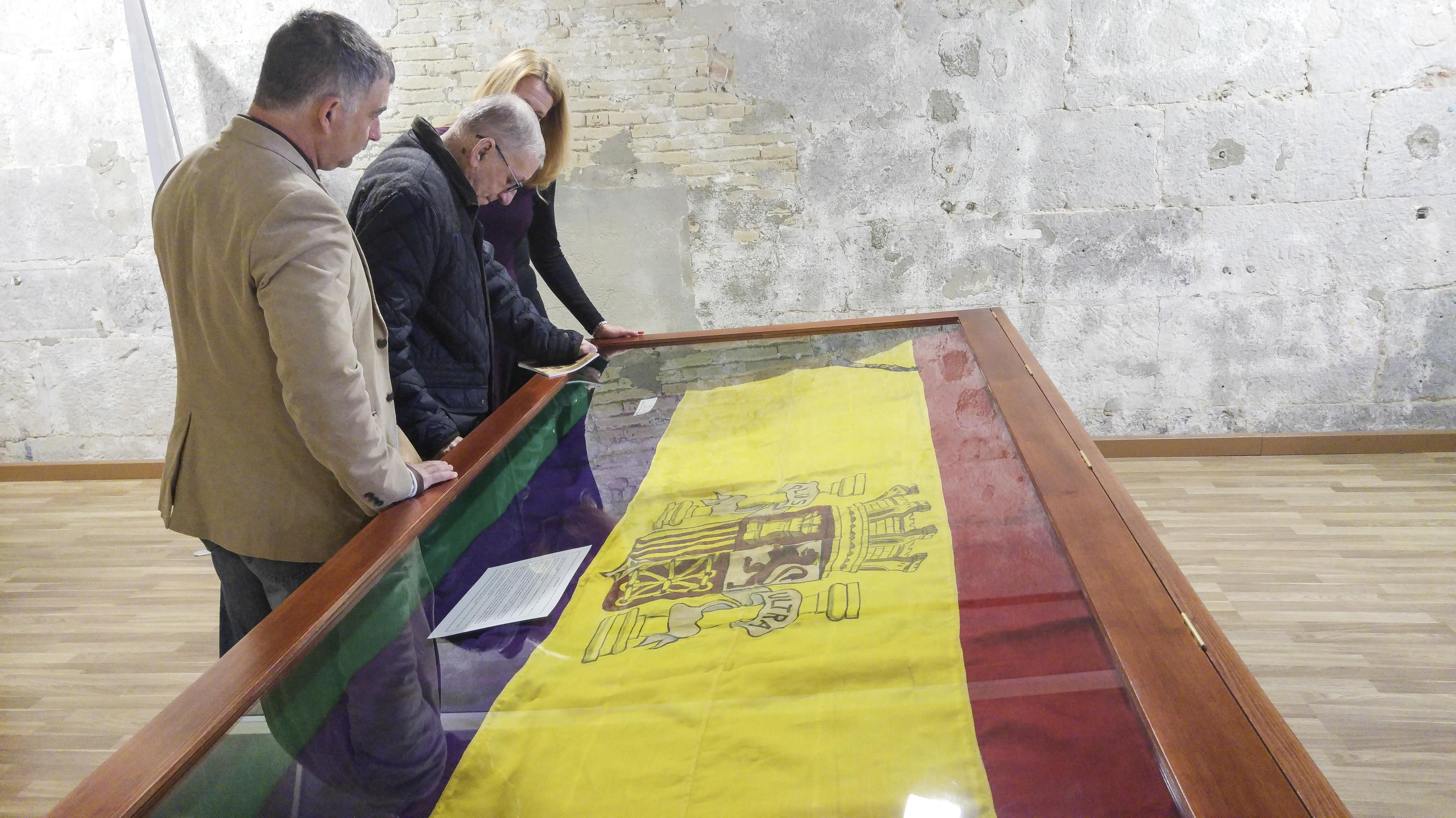 Exposición 'Gibraltar y la Guerra Civil Española'. Bandera republicana del José Luis Díez, entregada en agradecimiento por el comandante del buque al sindicato gibraltareño, TGWU. Se conserva en el Museo de Gibraltar.